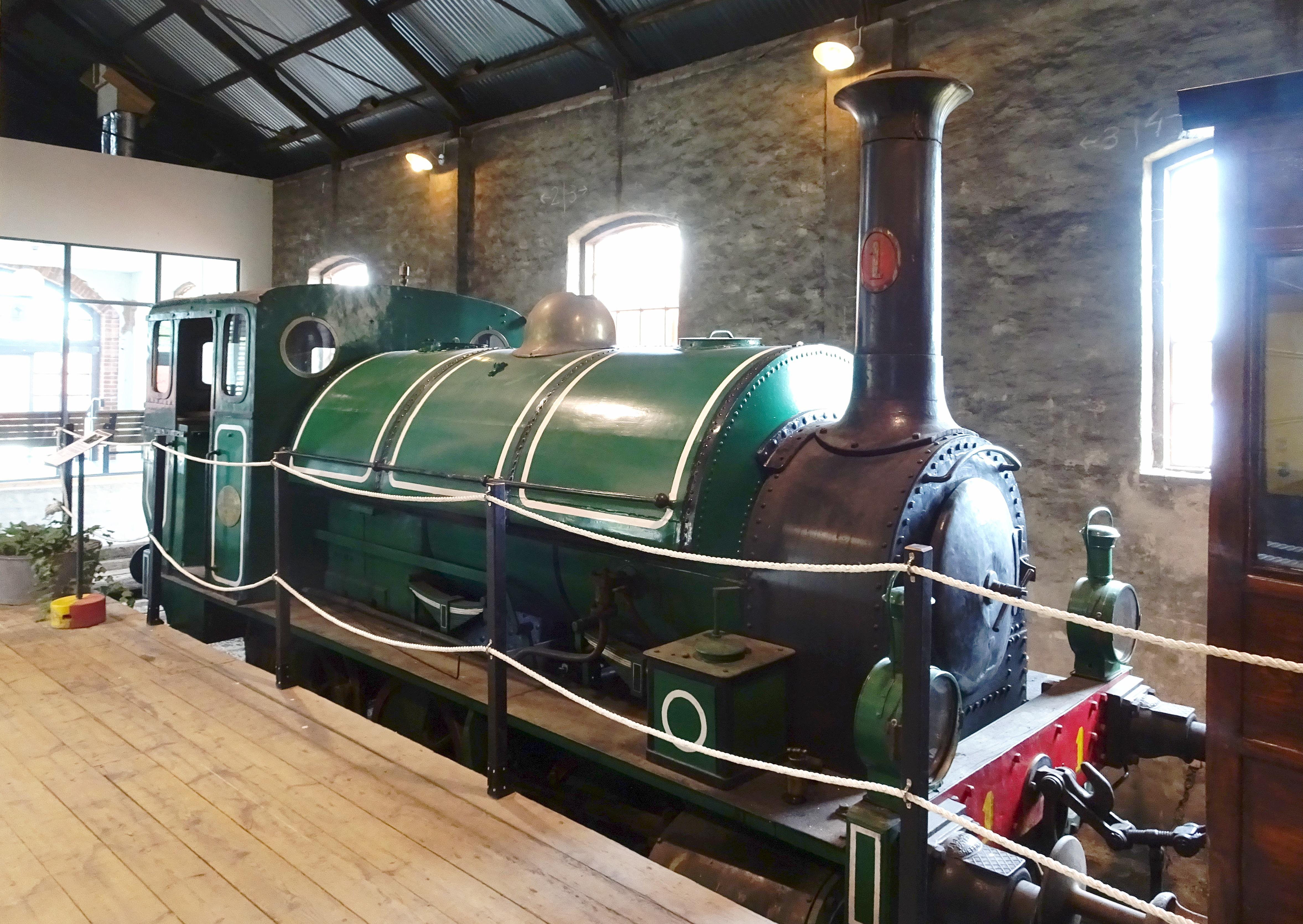 Nora station, museum med loket Sockerpullan från 1905